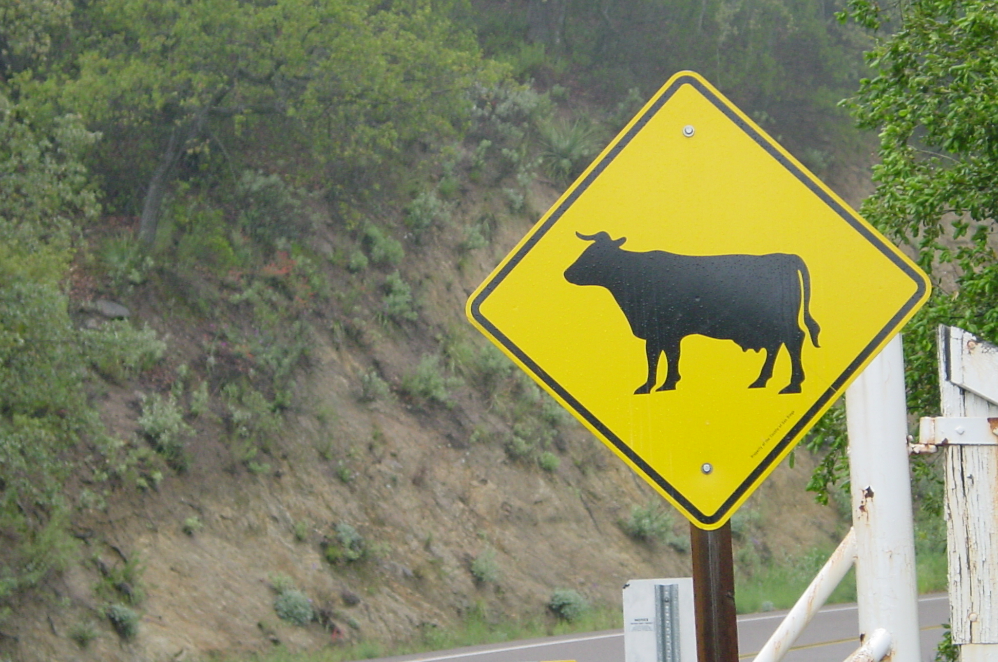 Lieu : États Unis d'Amérique, Californie, Route 79 en allant au mont Palomar